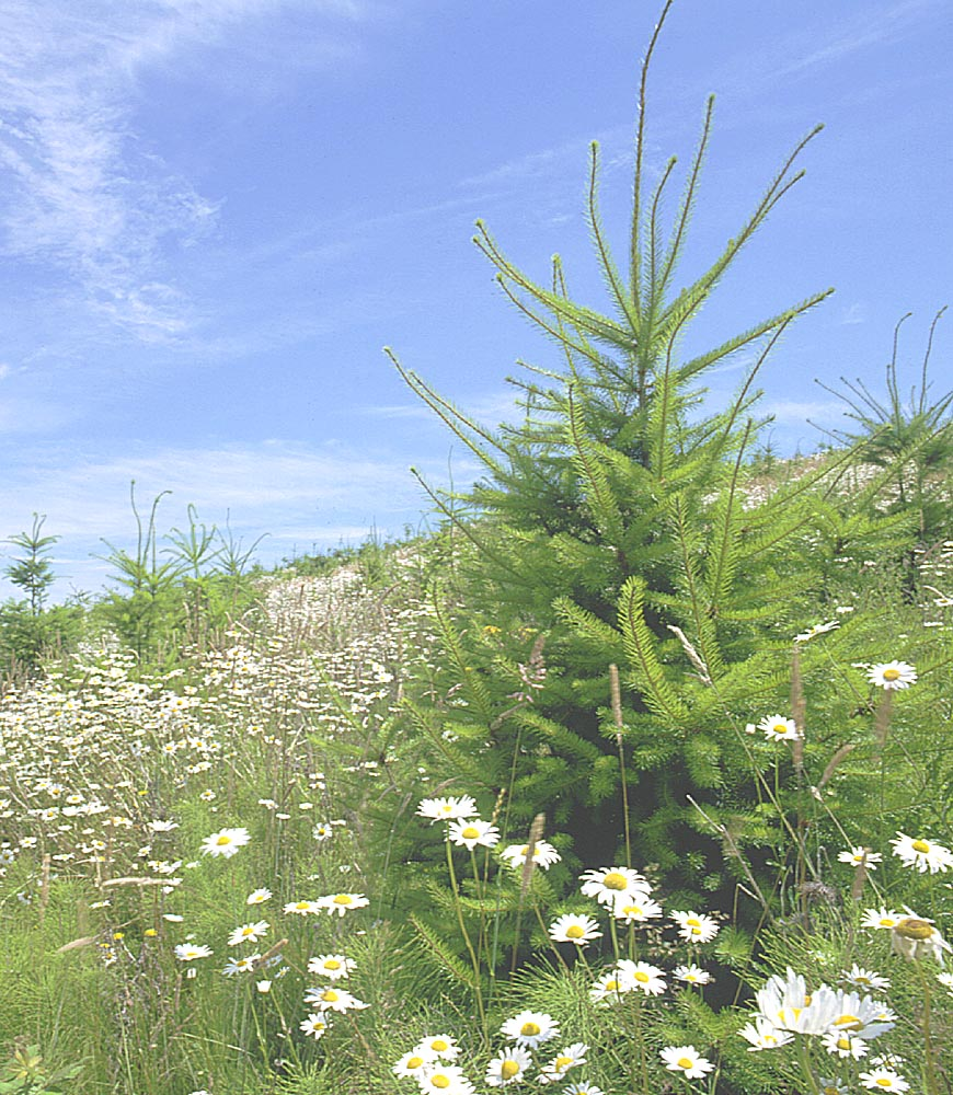 Parcelle en régénération.